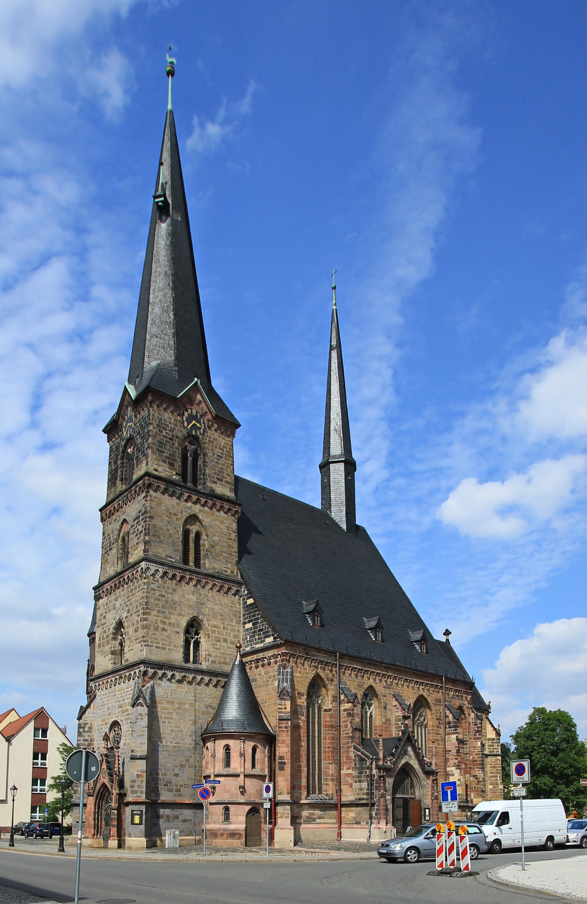 Sant.Katharinenkirche in Zwickau, Sachsen